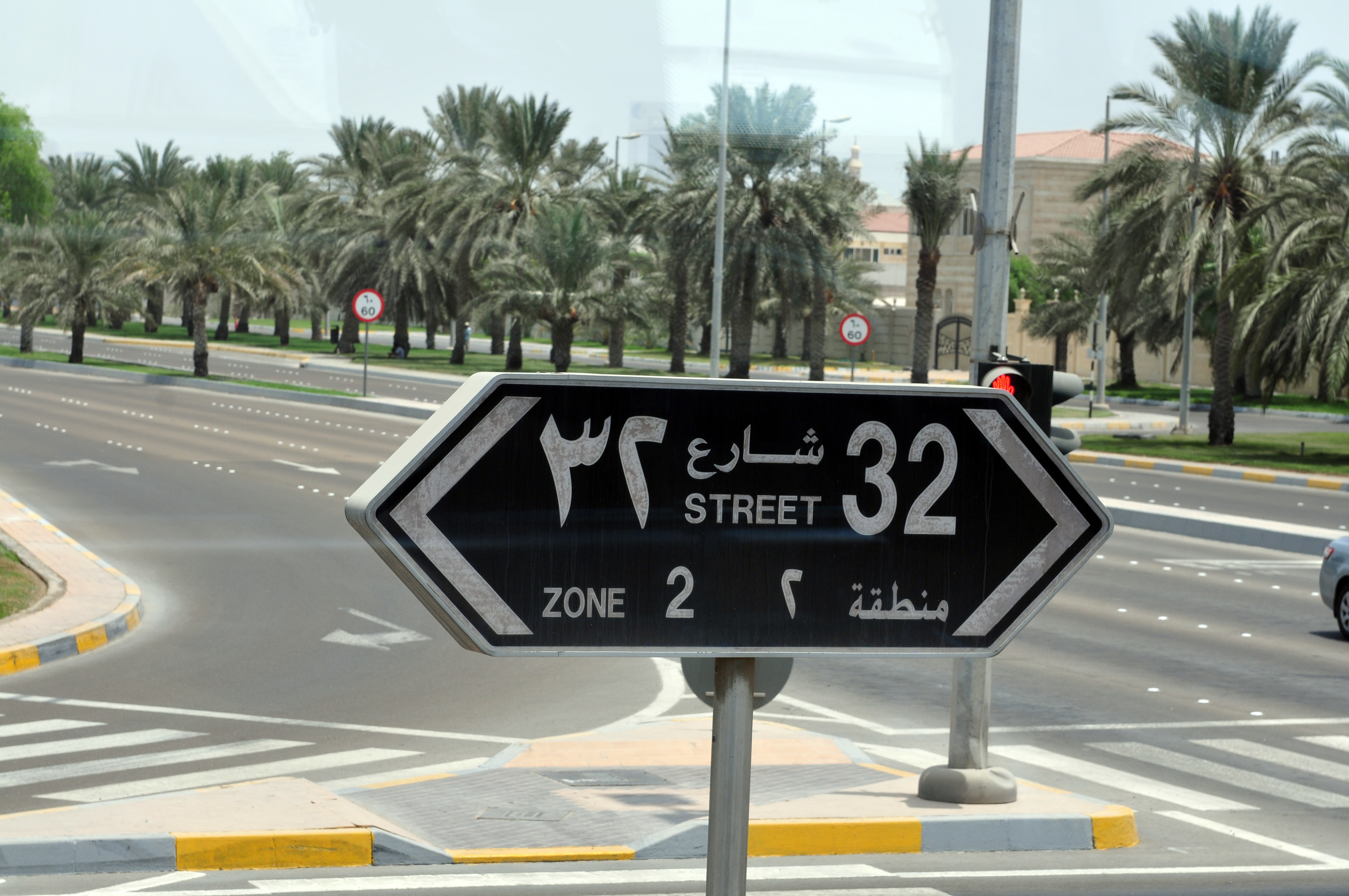 Wikimania 2013 Hongkong; Zwischenstop Abu Dhabi